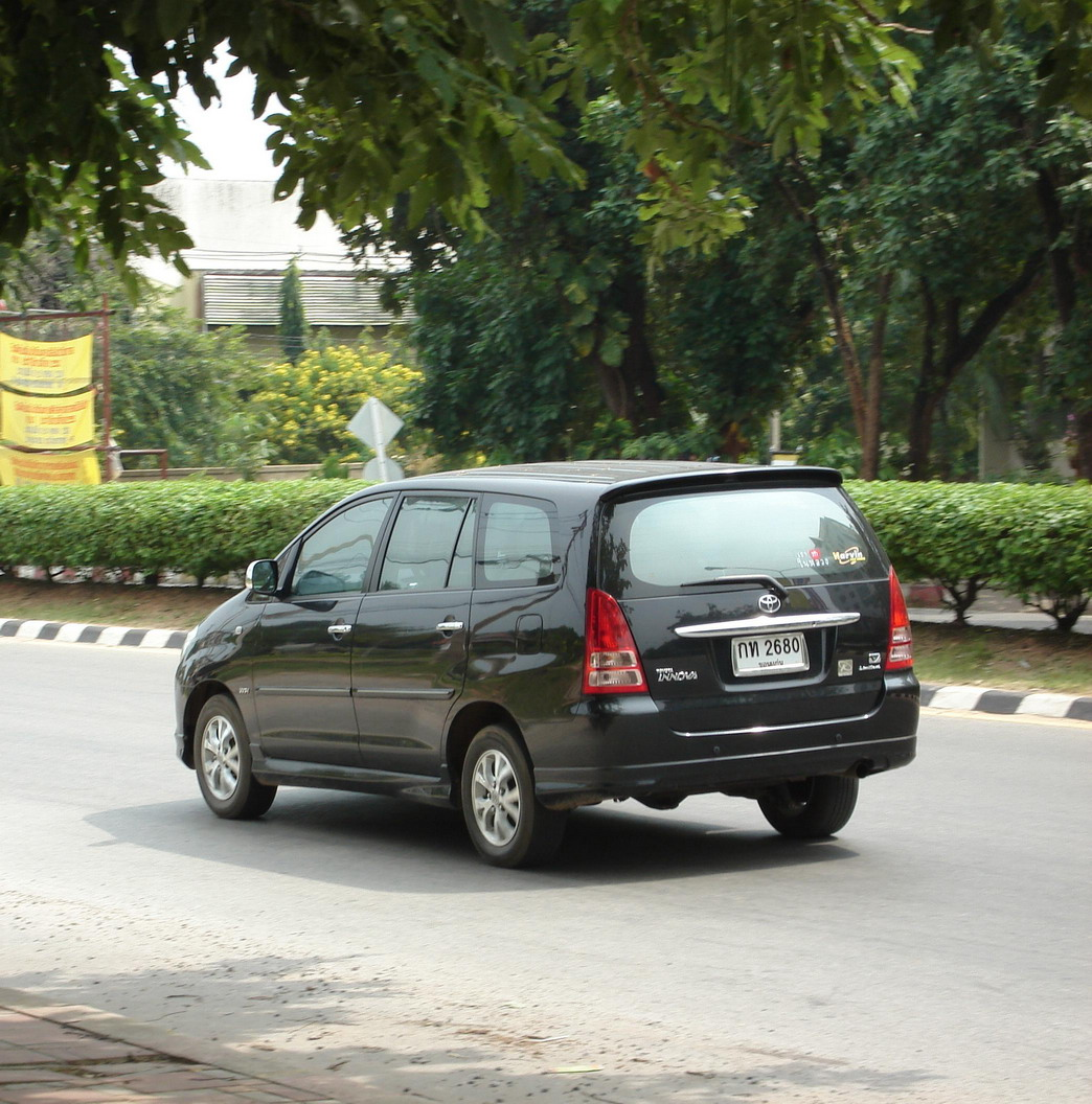 Toyota Innova - Khonkaen, Thailand